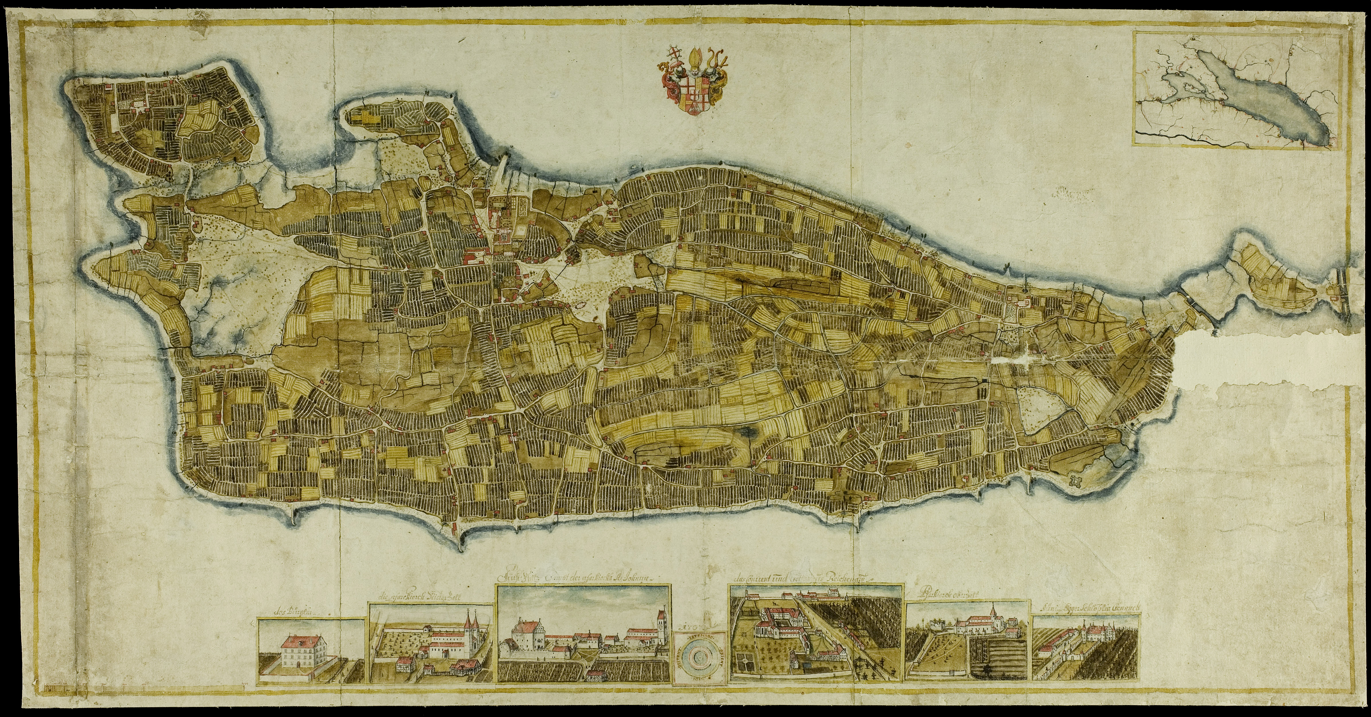 Insel Reichenau, 1707 (GLAK H Reichenau 1).